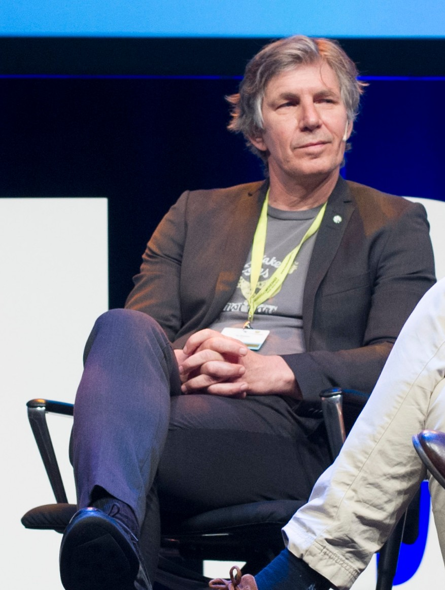 Medvirkende: Anders Giæver, VG,Frithjof Jacobsen, VG, Per Arne Kalbakk, NRK, Kadafi Zaman, TV 2, Per Elvestuen, Aslaug C. Henriksen TV 2, Pål T. Jørgensen, TV 2.